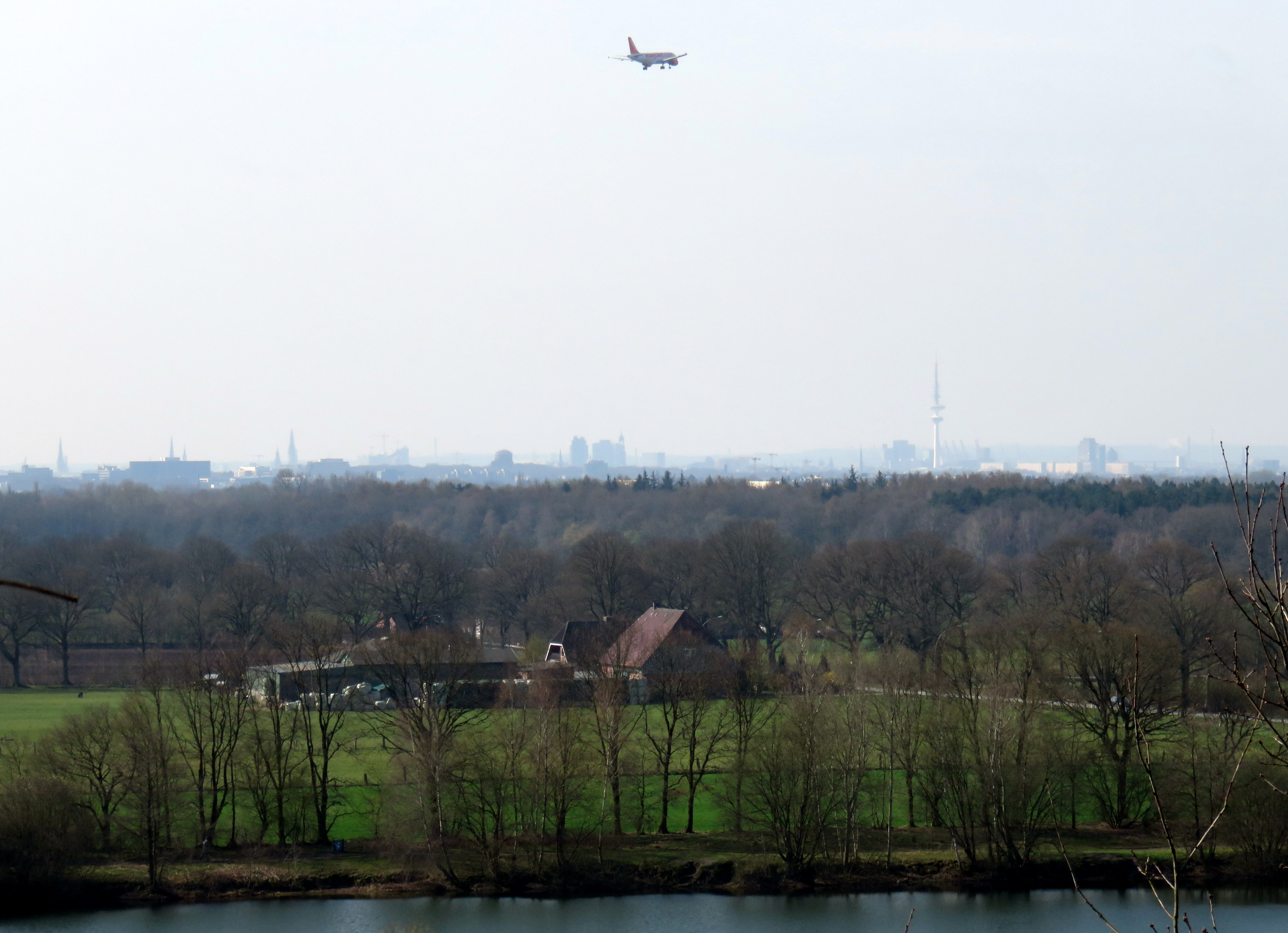 Blick vom Müllberg Hummelsbüttel nach Süden auf den Hummelsee und „Wohnwirtschaftsgebäude Glashütter Landstraße 182, am Horizont schemenhaft von links die Innenstadt-Kirchtürme Hamburgs sowie Elbphilharmonie, Planetarium, Michel und Fernsehturm, am rechten oberen Bild der Flughafen Hamburg mit rotem Tower. This is a photograph of an architectural monument.